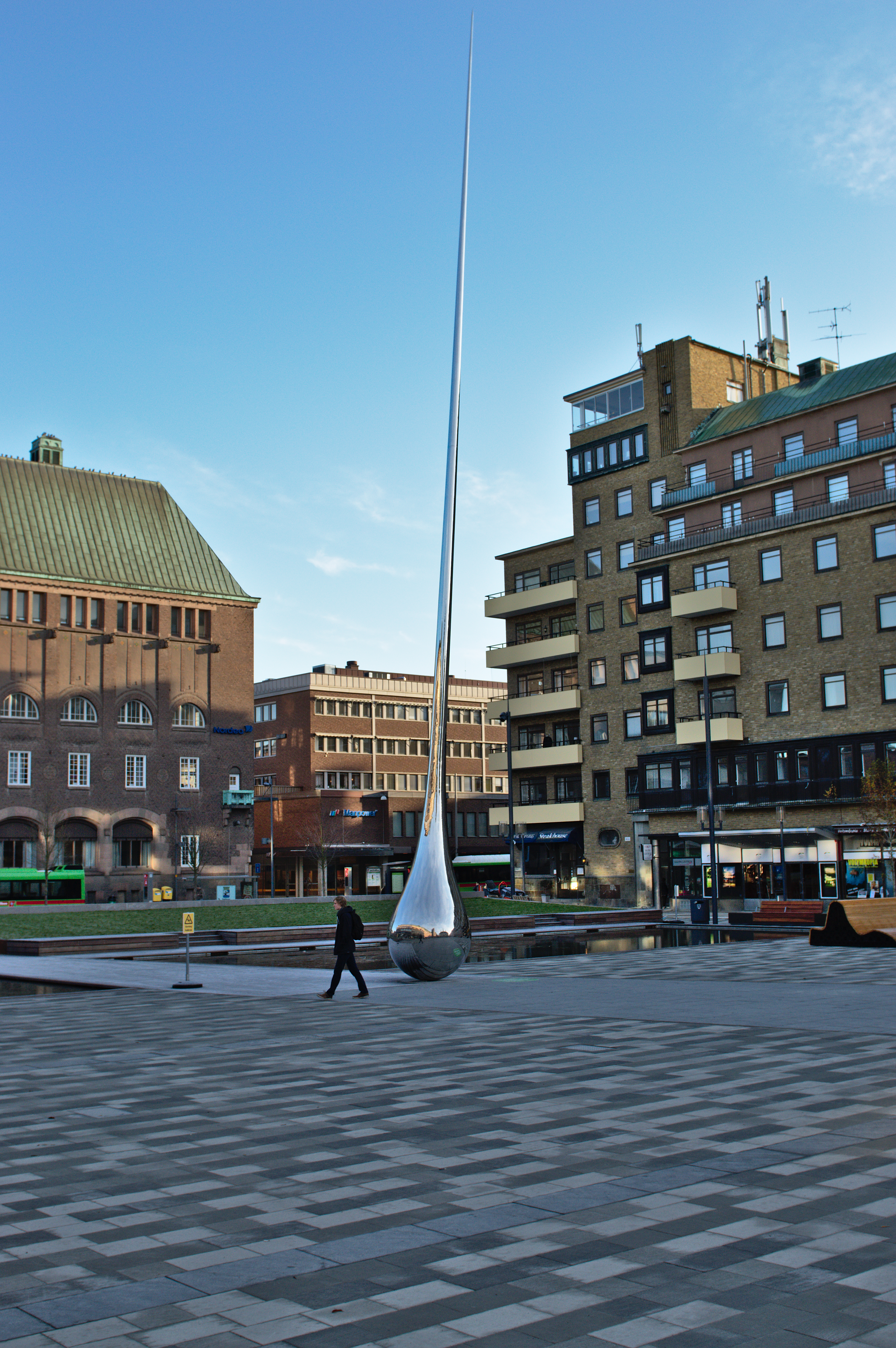 Konstverket "Pin point" på Fristadstorget i Eskilstuna.